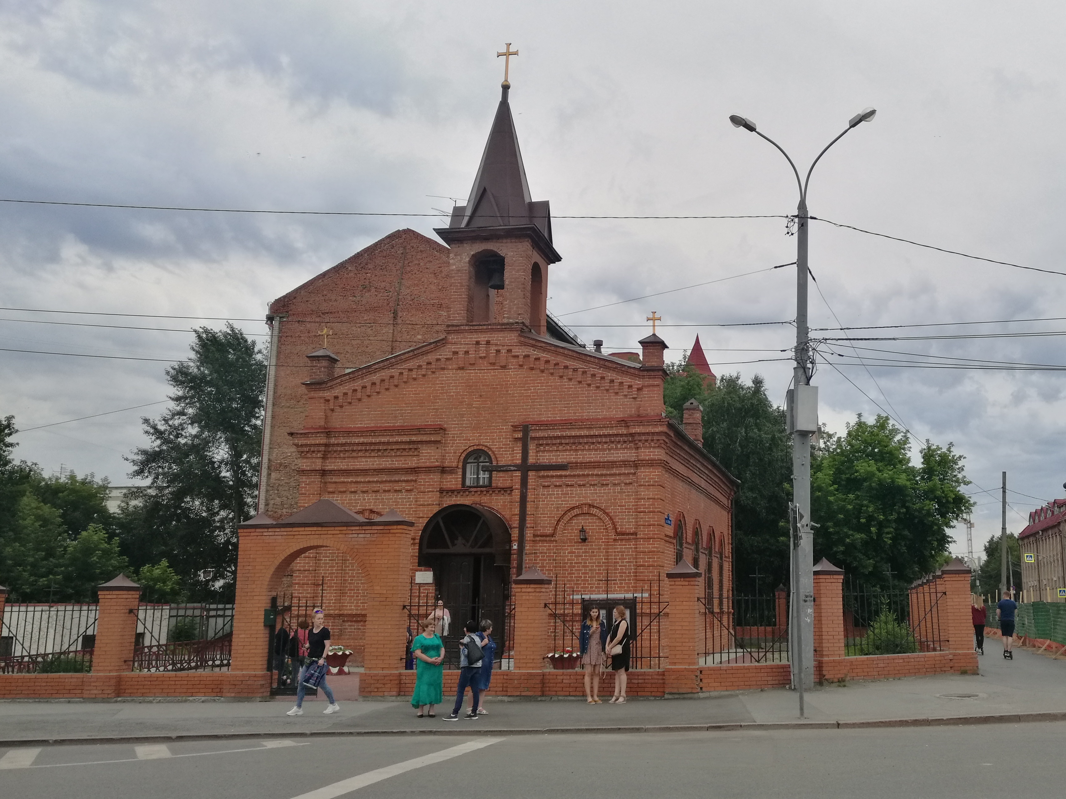 Preĝejo de Sankta Jozefo dum orgena koncerto. Tjumeno, Rusio.